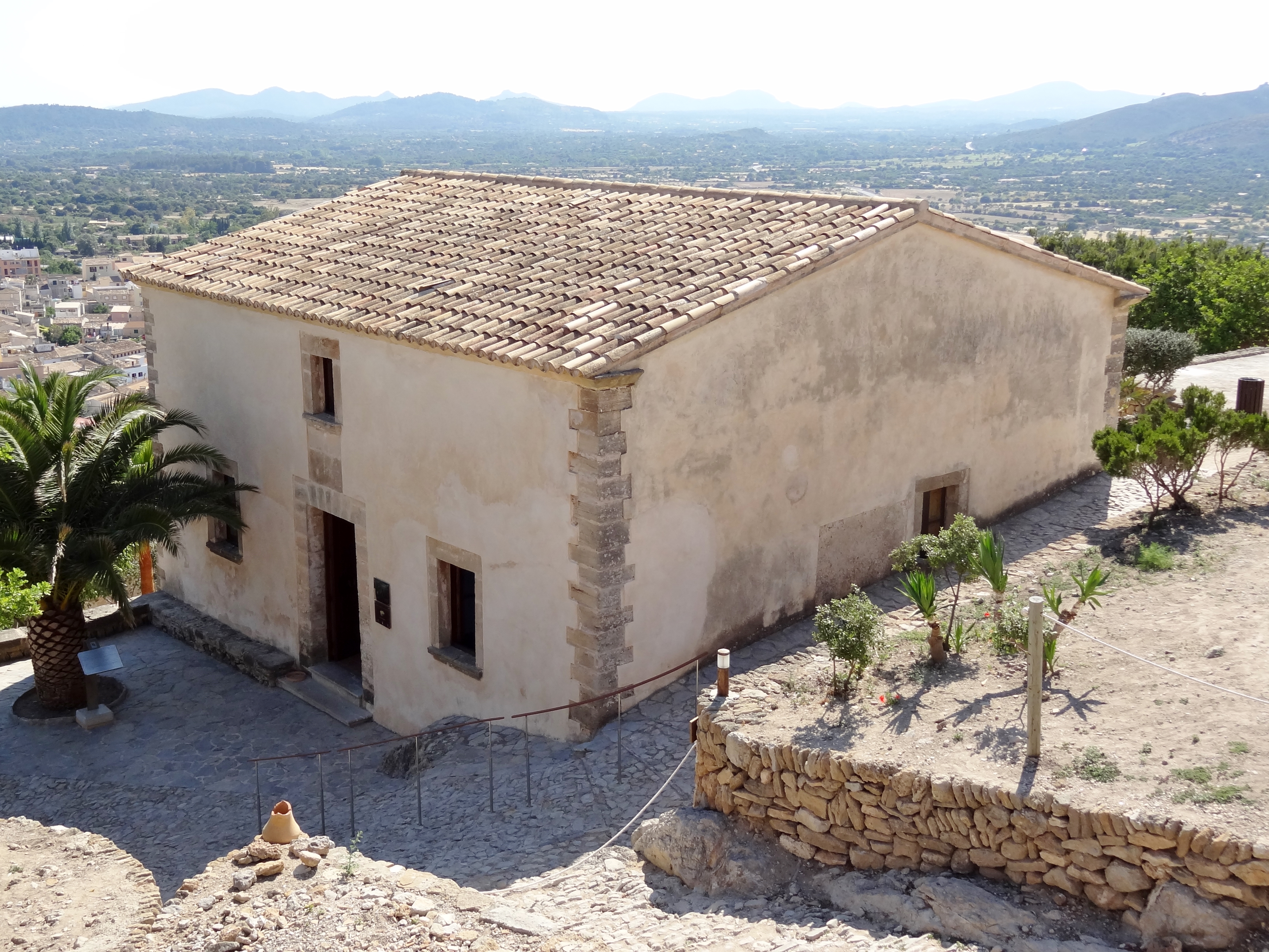 Castell de Capdepera, Gemeinde Capdepera, Mallorca, Spanien